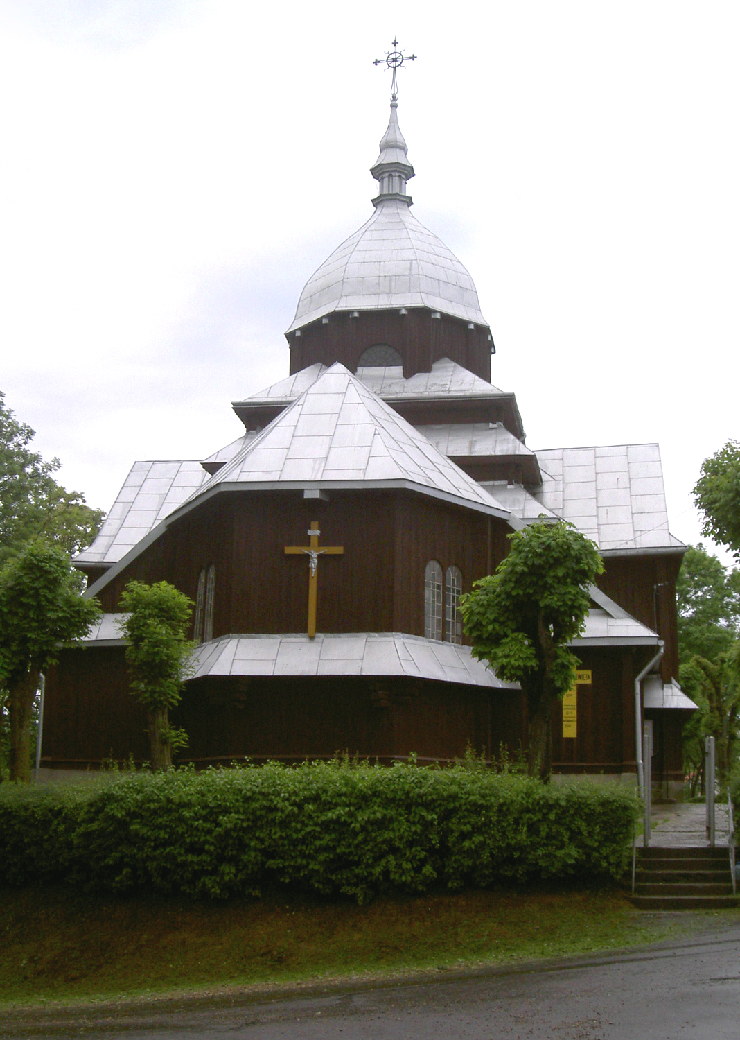 Fredropol, Poland • Dawna cerkiew greckokatolicka / Old greek catholic church